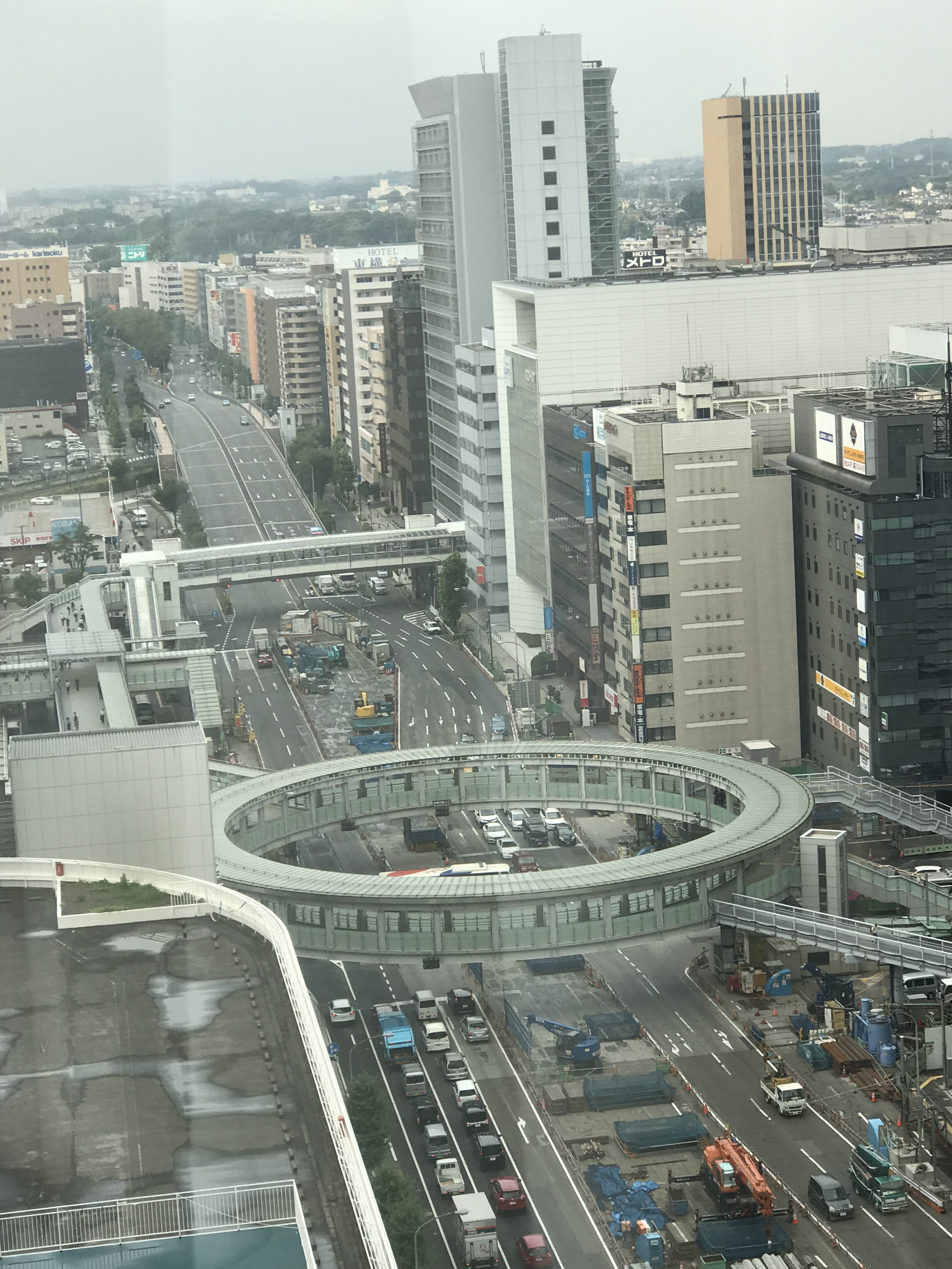 Vista da entrada á estación central de Shin Yokohama, xullo de 2018.